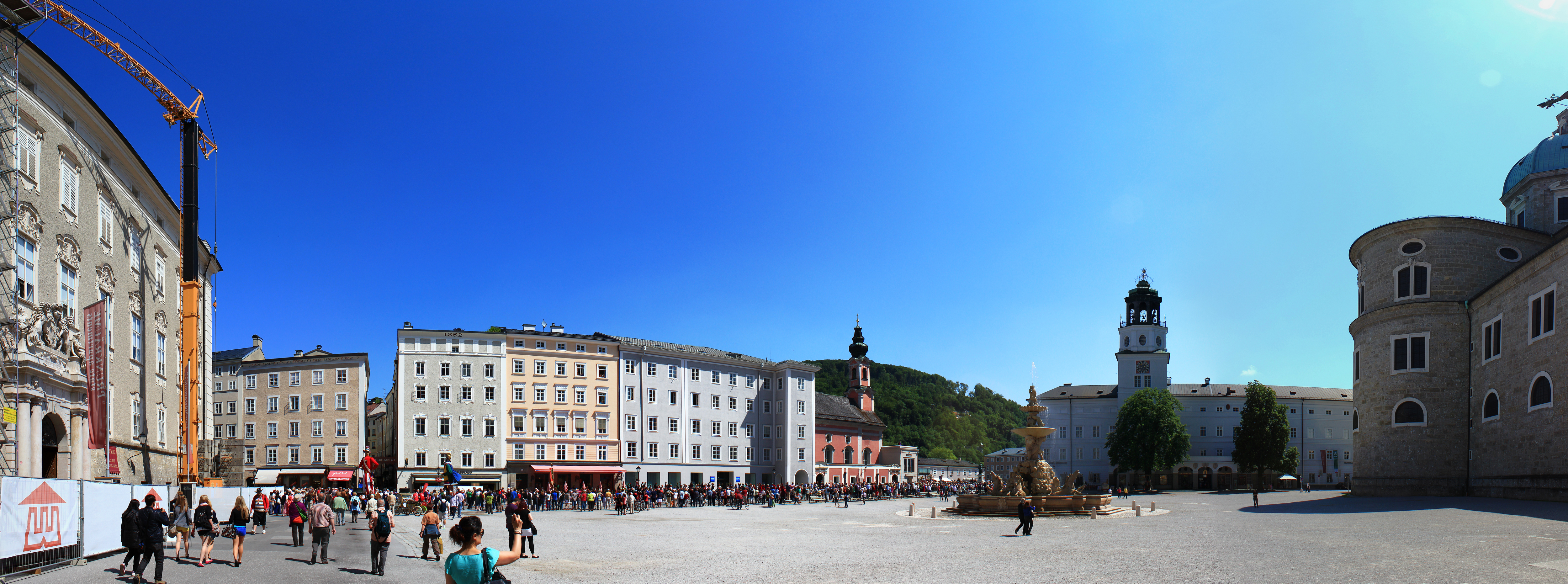 Panoramafoto Residenzplatz Salzburg